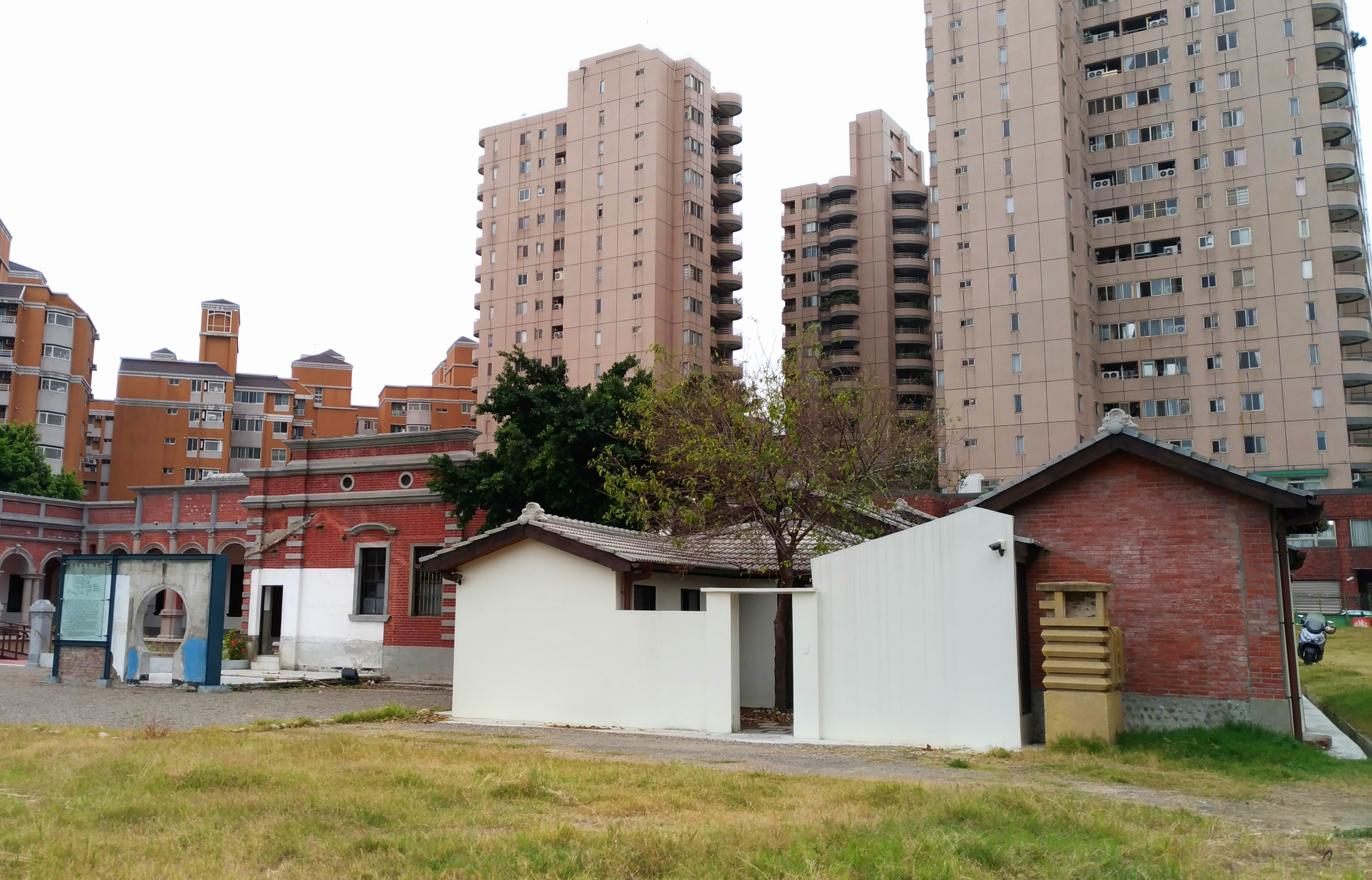 中文（台灣）: 林懋陽宅第右側眷村建築